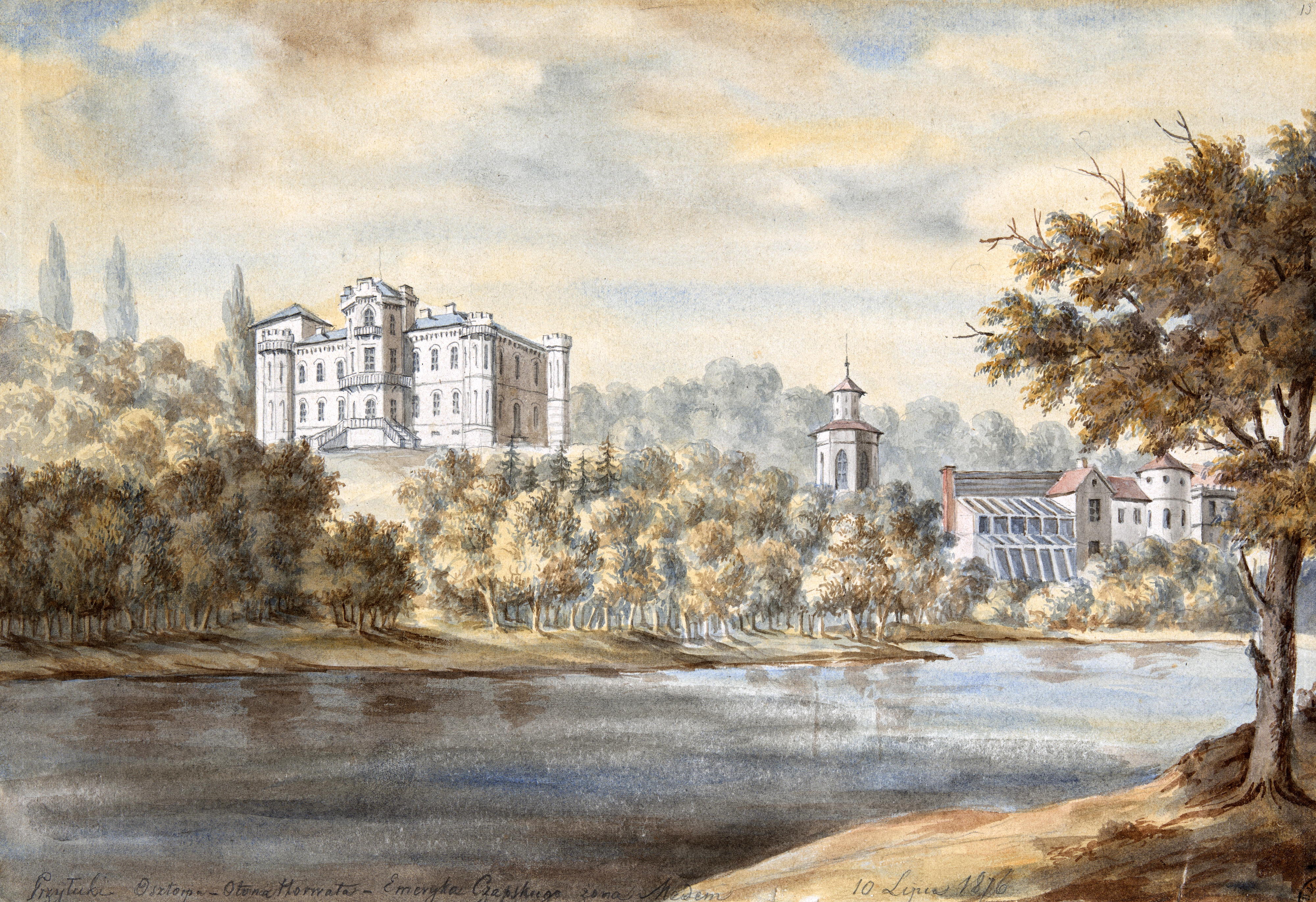 Беларуская (тарашкевіца): Прылукі (Pryłuki), сядзіба Чапскіх (Čapski) з боку ракі Пцічы (Pcič)